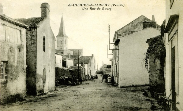 Une rue du bourg, Saint-hilaire-de-Loulay